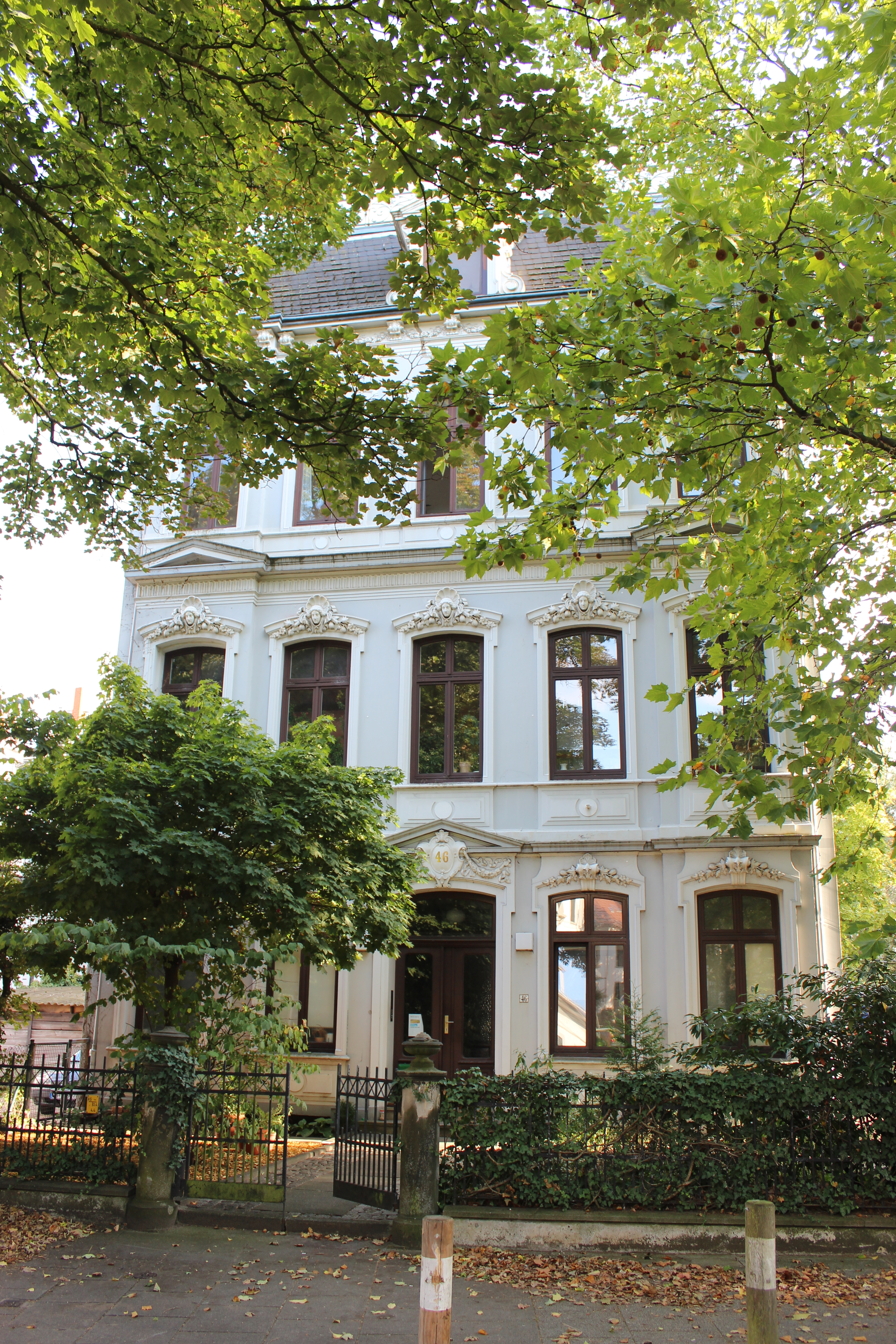 St. Remberti, Schwestern- und Gemeindehaus in Bremen, Rembertiring 46Das abgebildete Objekt ist ein geschütztes Kulturdenkmal in der Freien Hansestadt Bremen, mit der Nr. 1027 beim Landesamt für Denkmalpflege registriert.